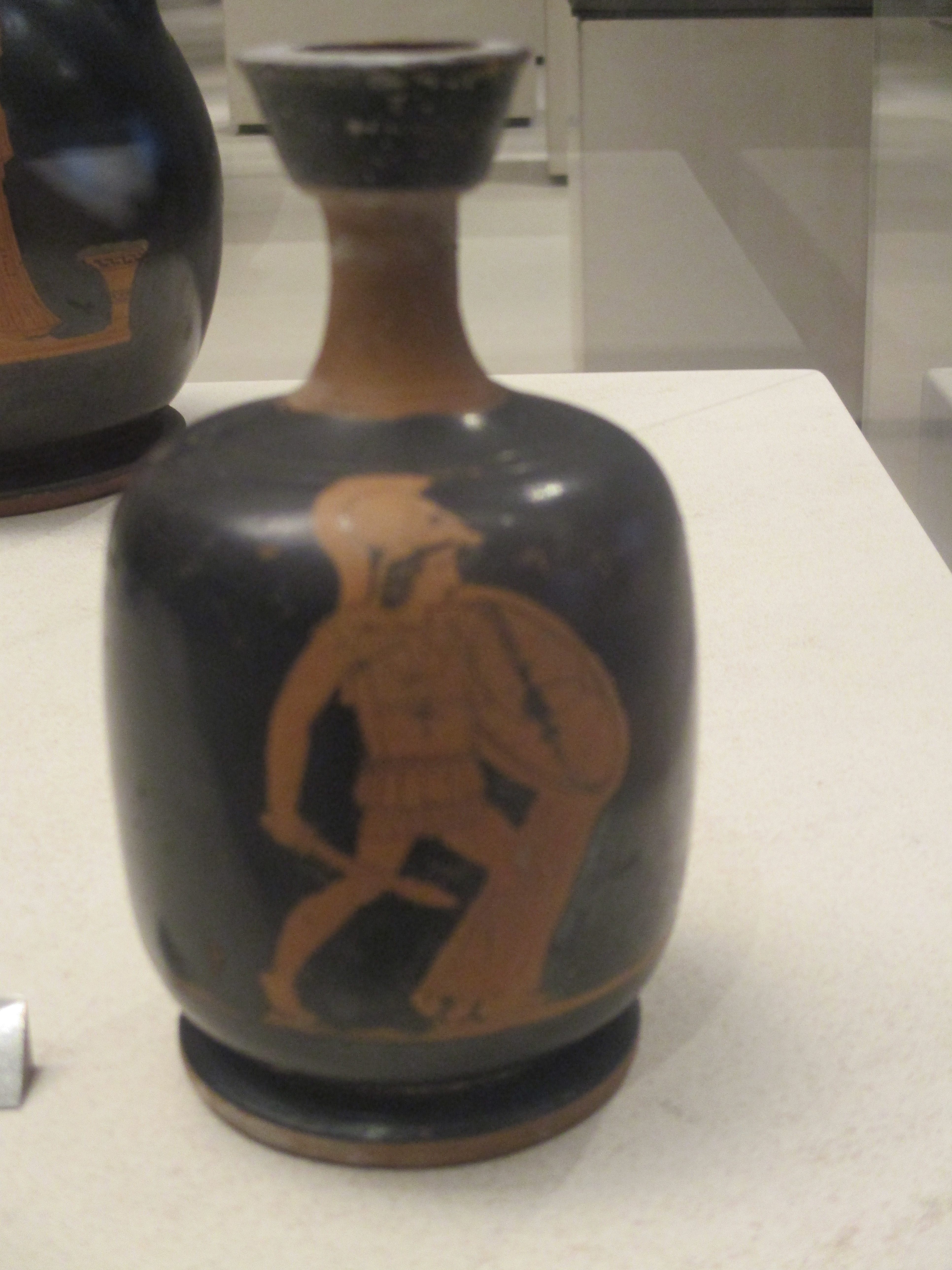 Lécythe aryballisque en provenance d'Attique (Thisbé en Béotie) représentant un jeune hoplite. 430-420 av. J.-C.; collection du Petit Palais (Paris), legs Dutuit (1902). Inventaire ADUT 00354